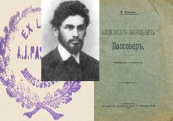 Александр Яковлевич Пассовер - русский присяжный поверенный XIX века